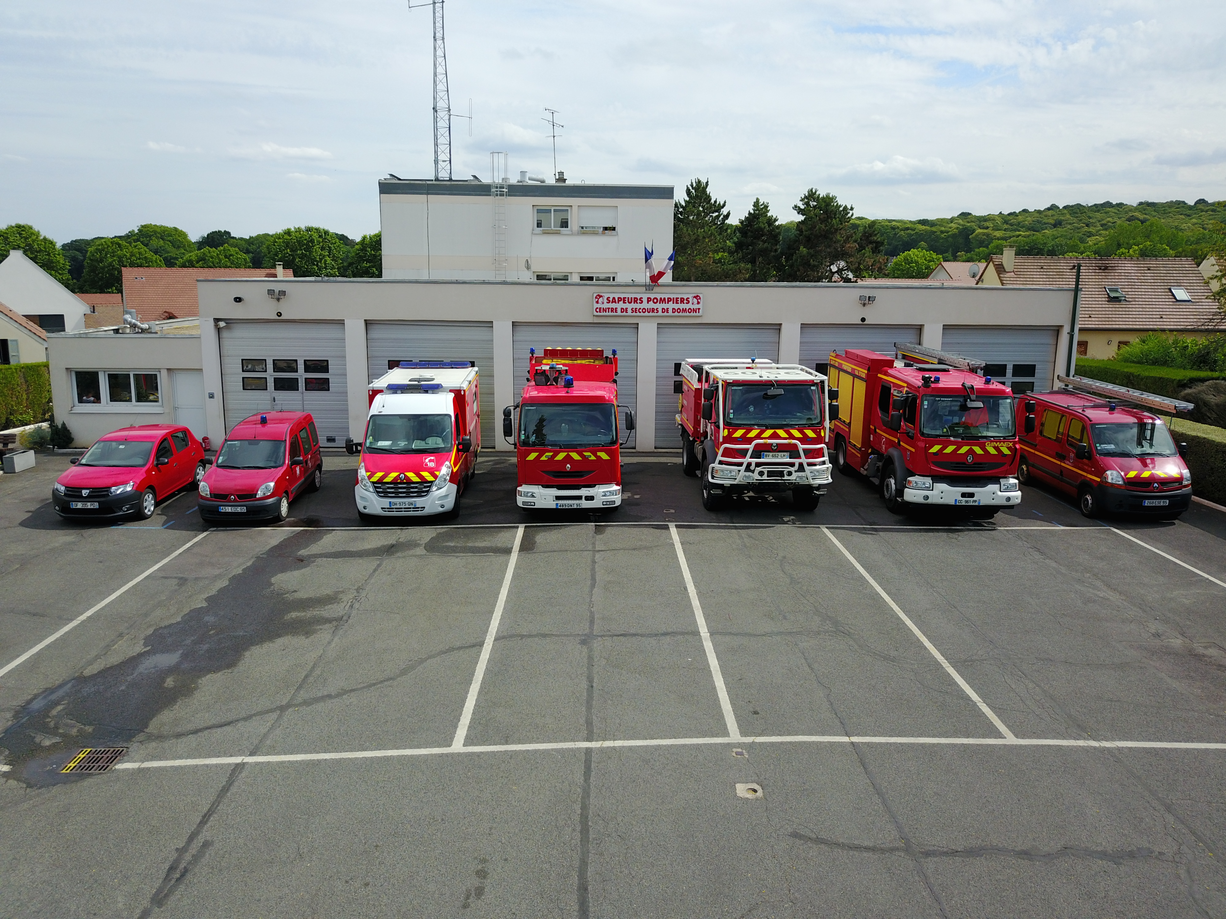 Centre de secours de Domont